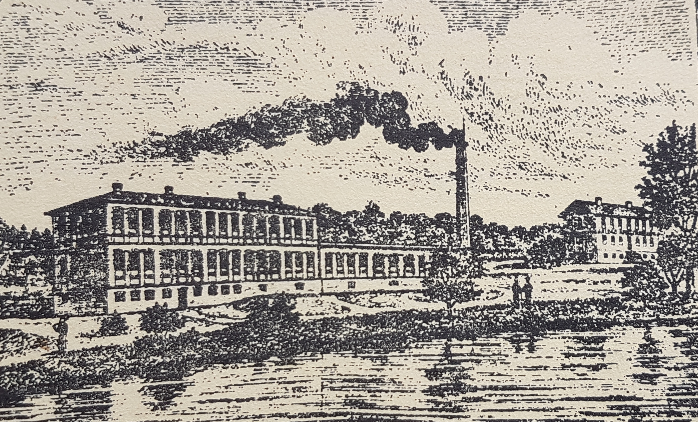 Halda urfabrik i Svängsta tecknad av okänd konstnär avfotograferad från häftet Något om Haldafabrikens historia